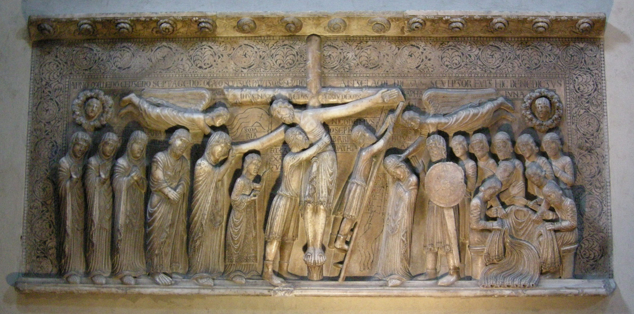 Deposizione dalla croce di benedetto antelami